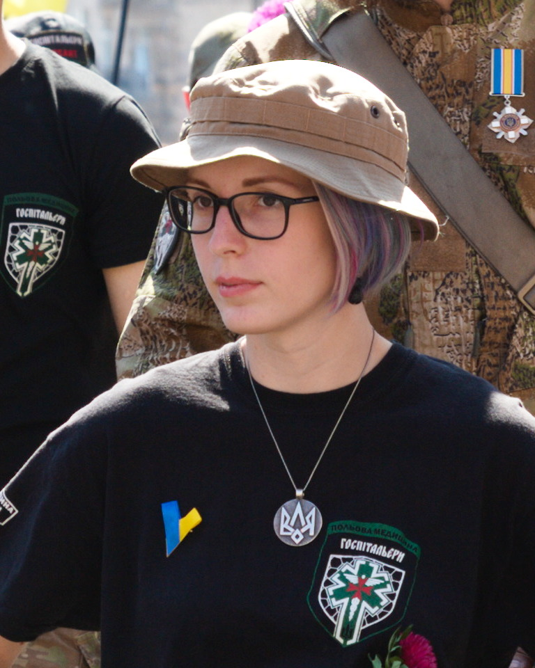 Яна Зінкевич, засновник і керівник медичного батальйону «Госпітальєри», на Марші захисників України під час святкування Дня Незалежності України у Кєві, 24 серпня 2019 року